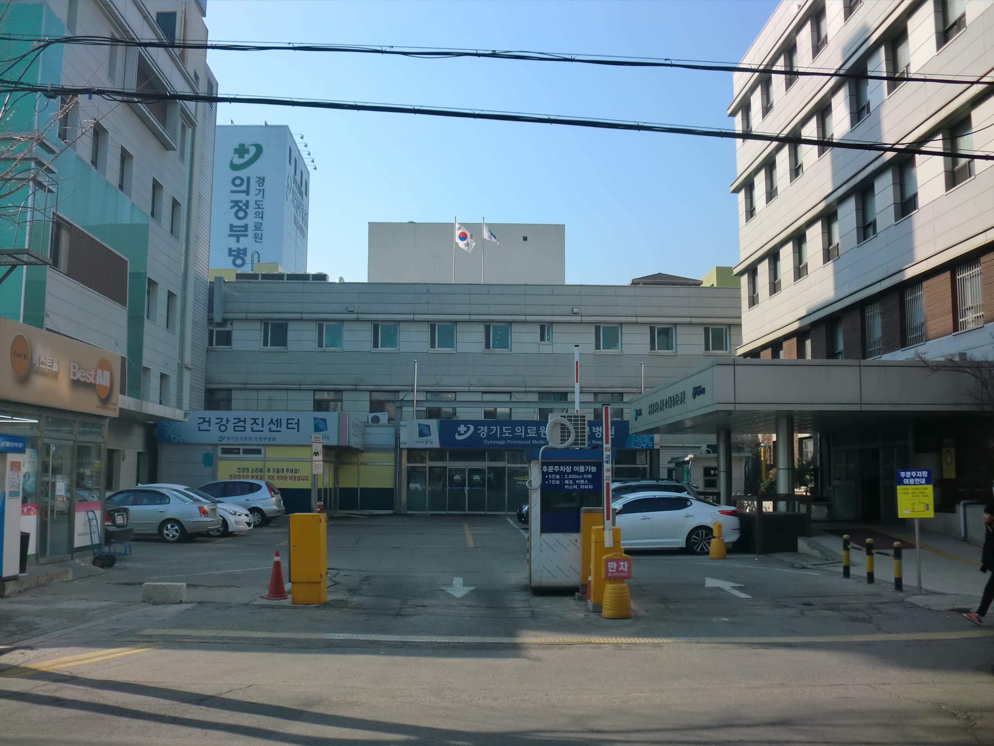 경기도 의정부시에 있는 경기도립의료원 의정부병원